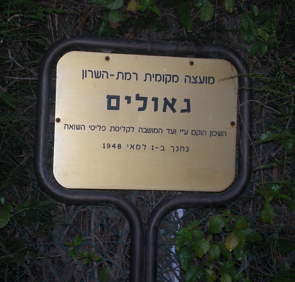 Ramat HaSharon